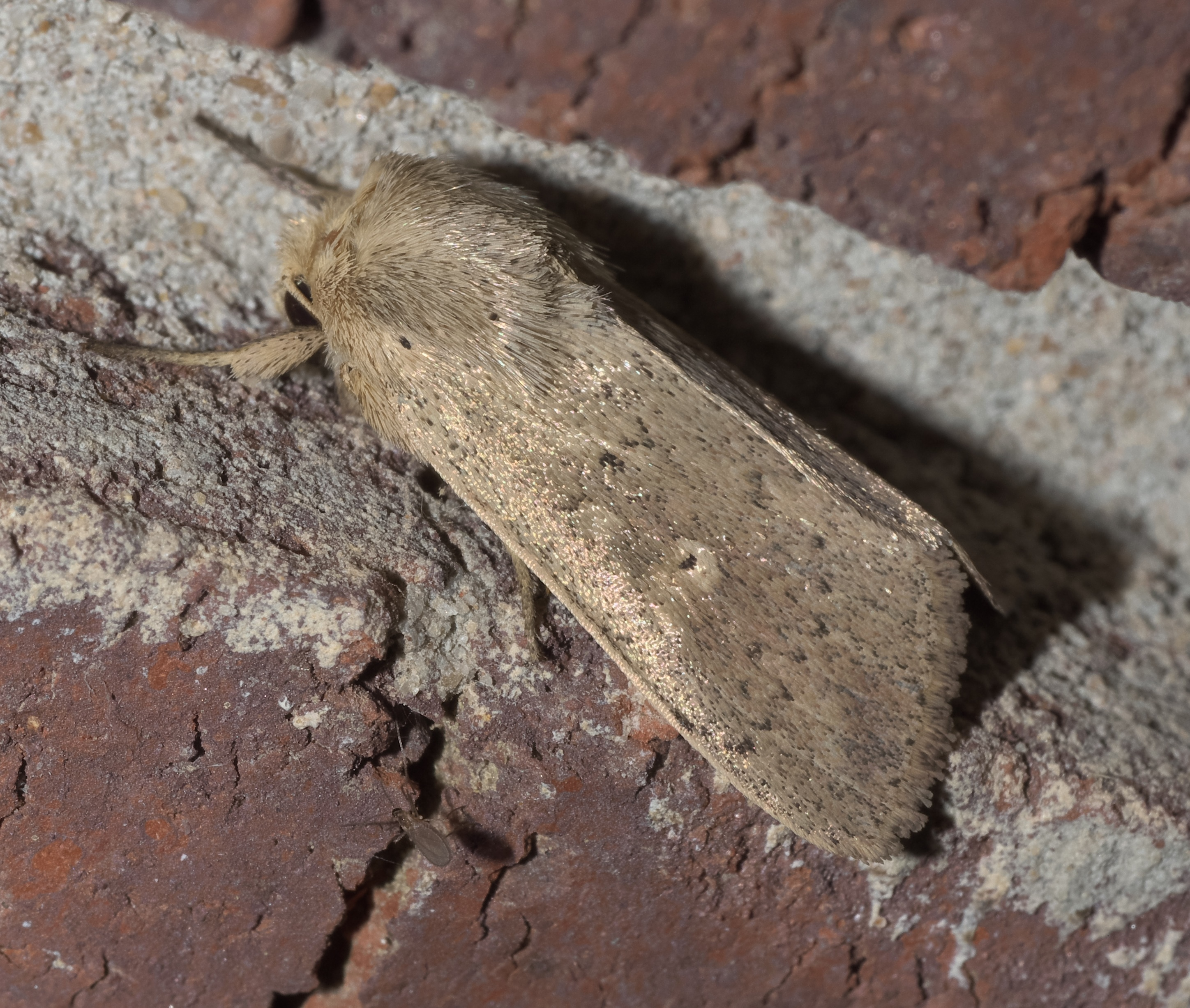 Leucania ursula, Ursula Wainscot - Hodges #10461, ID Confidence: 88